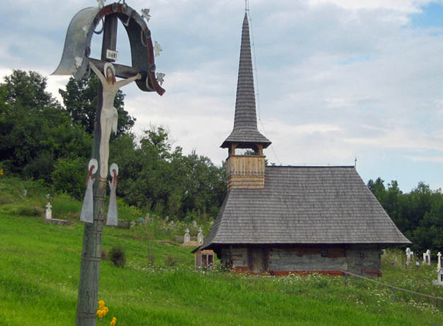 Biserica de lemn din Prodăneşti, Sălaj. Latura de sud. Foto: Mihai Petriş, 12 decembrie 2007.